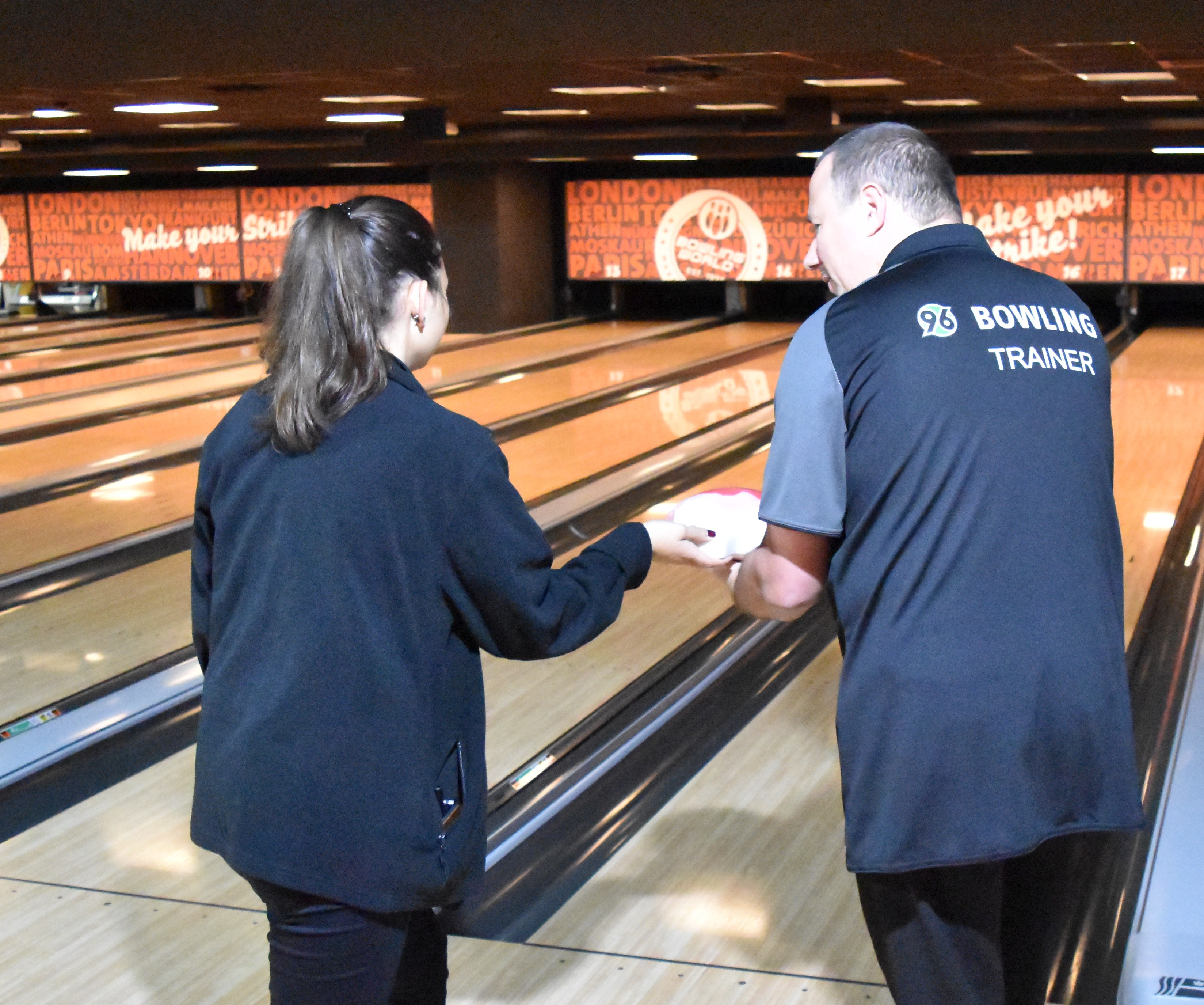 Ein Bowlingtrainer gibt Anweisungen